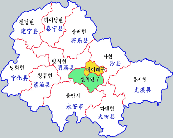 싼밍시 현급행정도